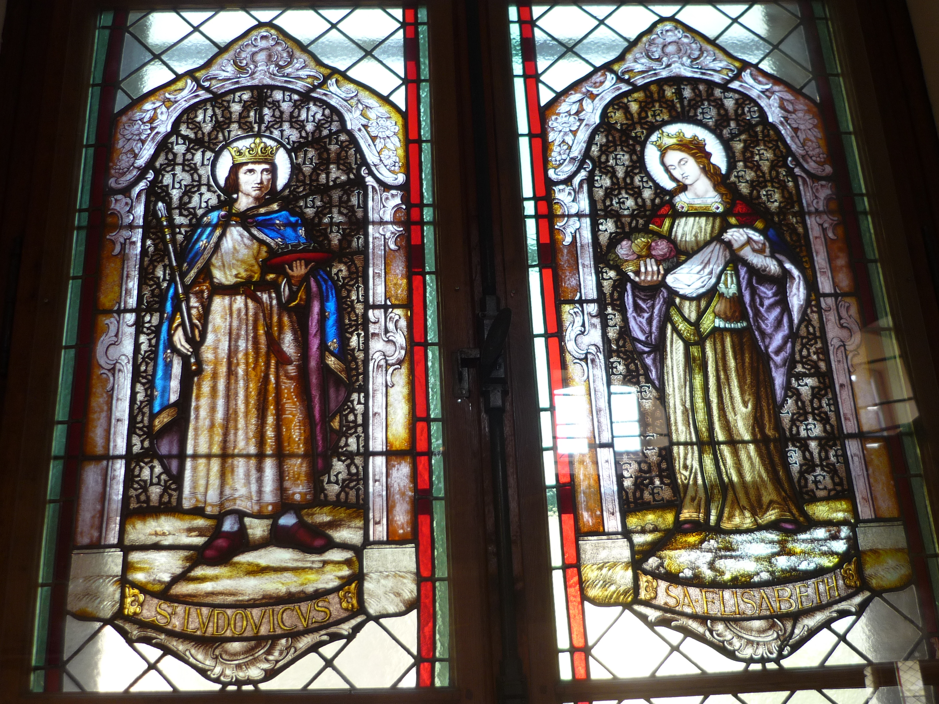 Vitraux de Saint-Louis et Sainte-Elisabeth de Théophile Bohl (atelier de vitraux Haguenau, Alsace, années 20) dans la chapelle de l'ancien hôpital de Haguenau devenue l'Espace Saint-Martin.